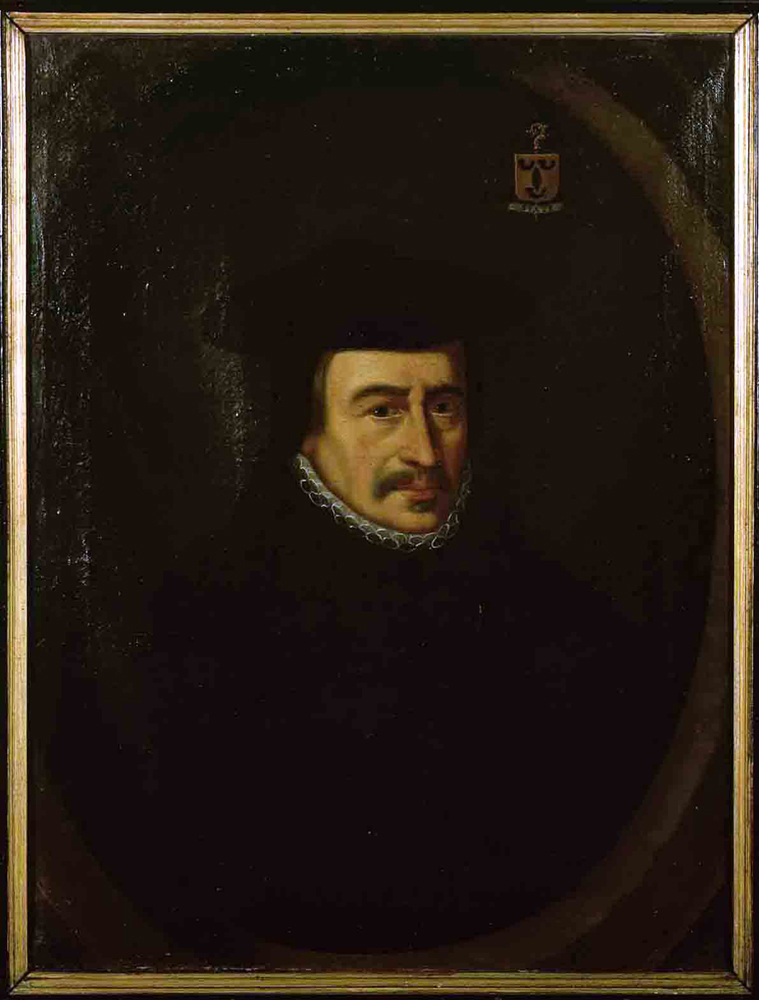 Sint-Baafskathedraal, Gent Portret van Mgr. Cornelius Jansenius, inv nr: 499/1